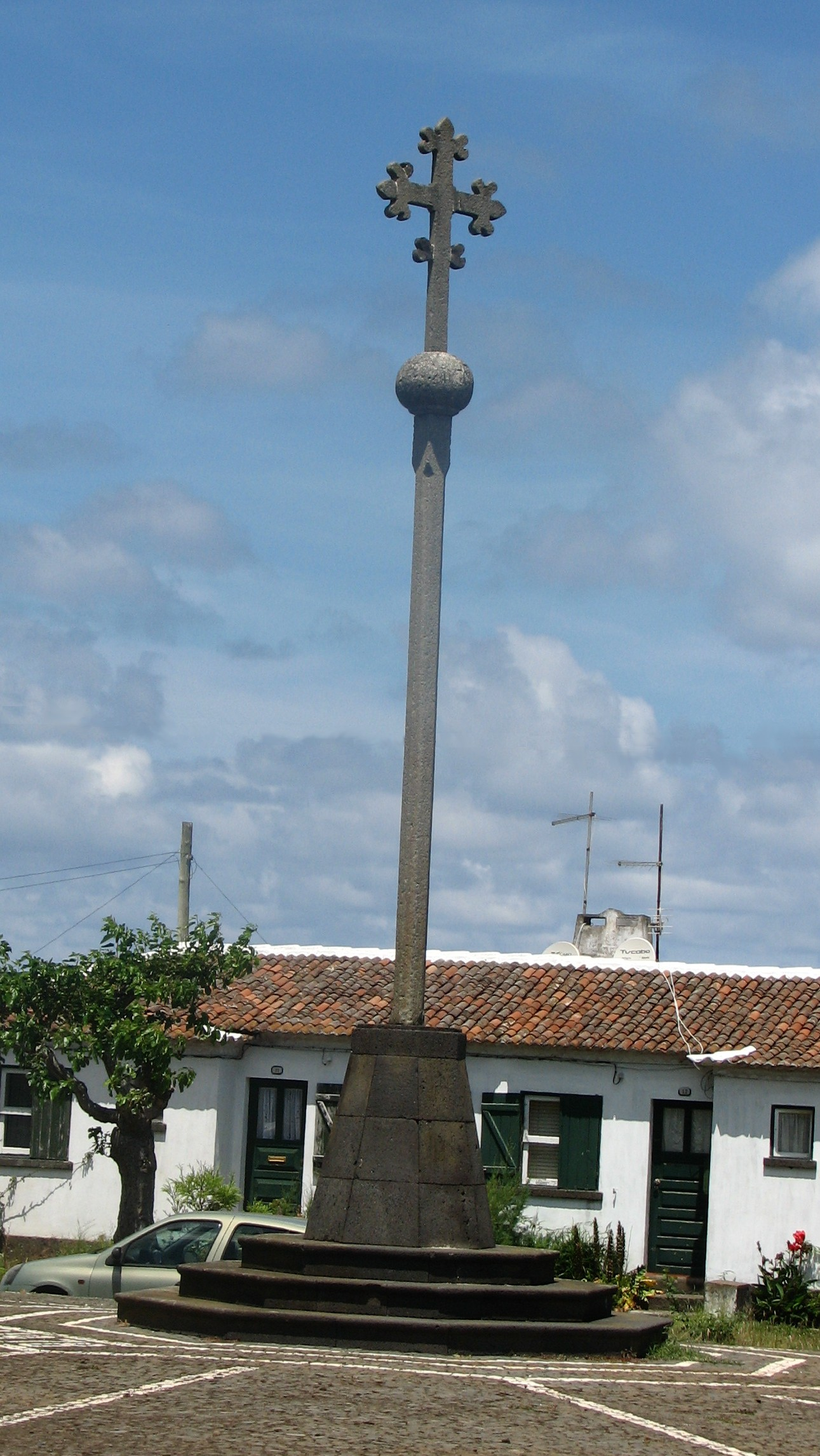 The famous Cruz da Barra (from c. 1520) at Santa Cruz da Graciosa, Azores.